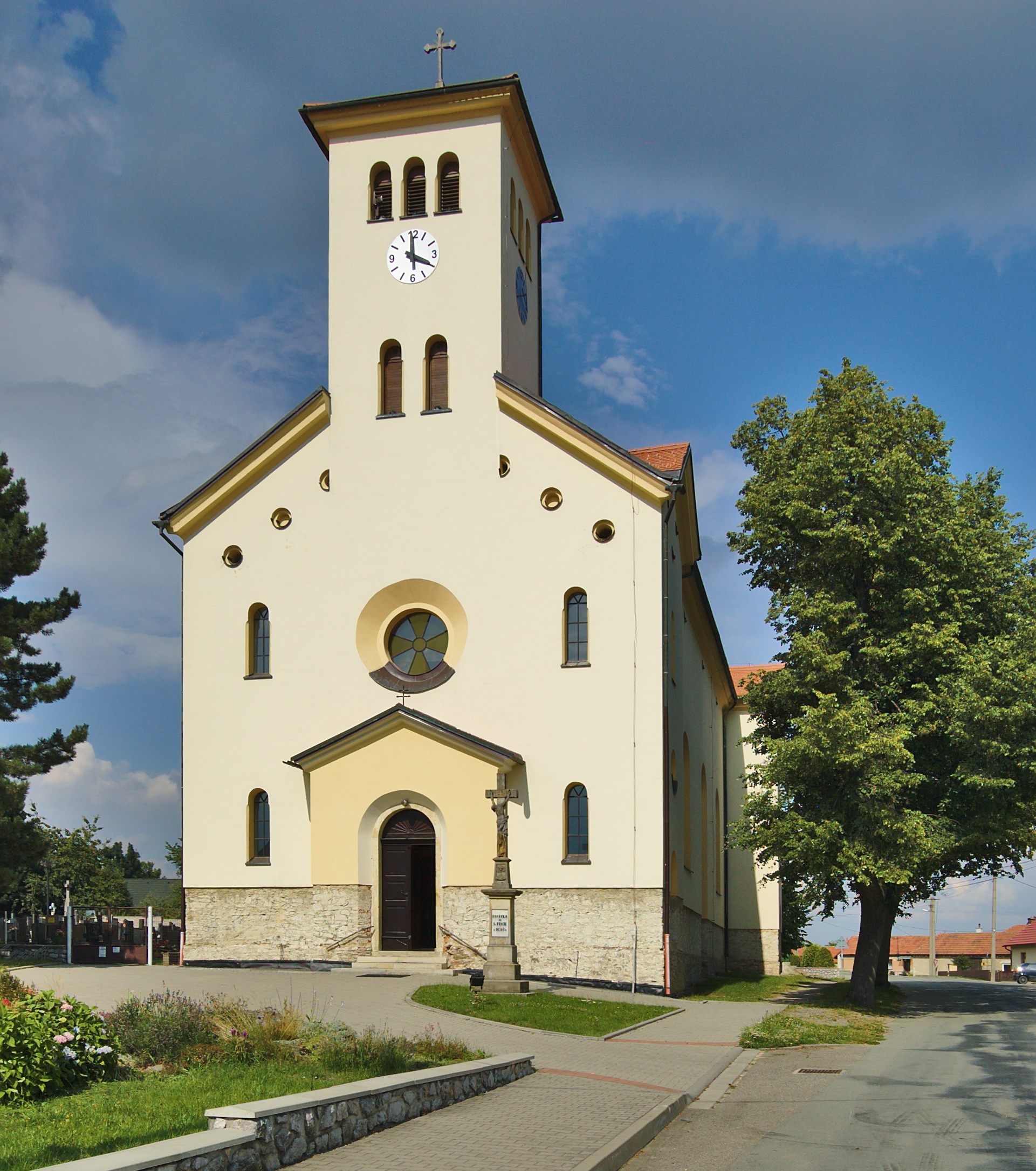 Kostel svatých Cyrila a Metoděje, Molenburk, Vysočany, okres Blansko